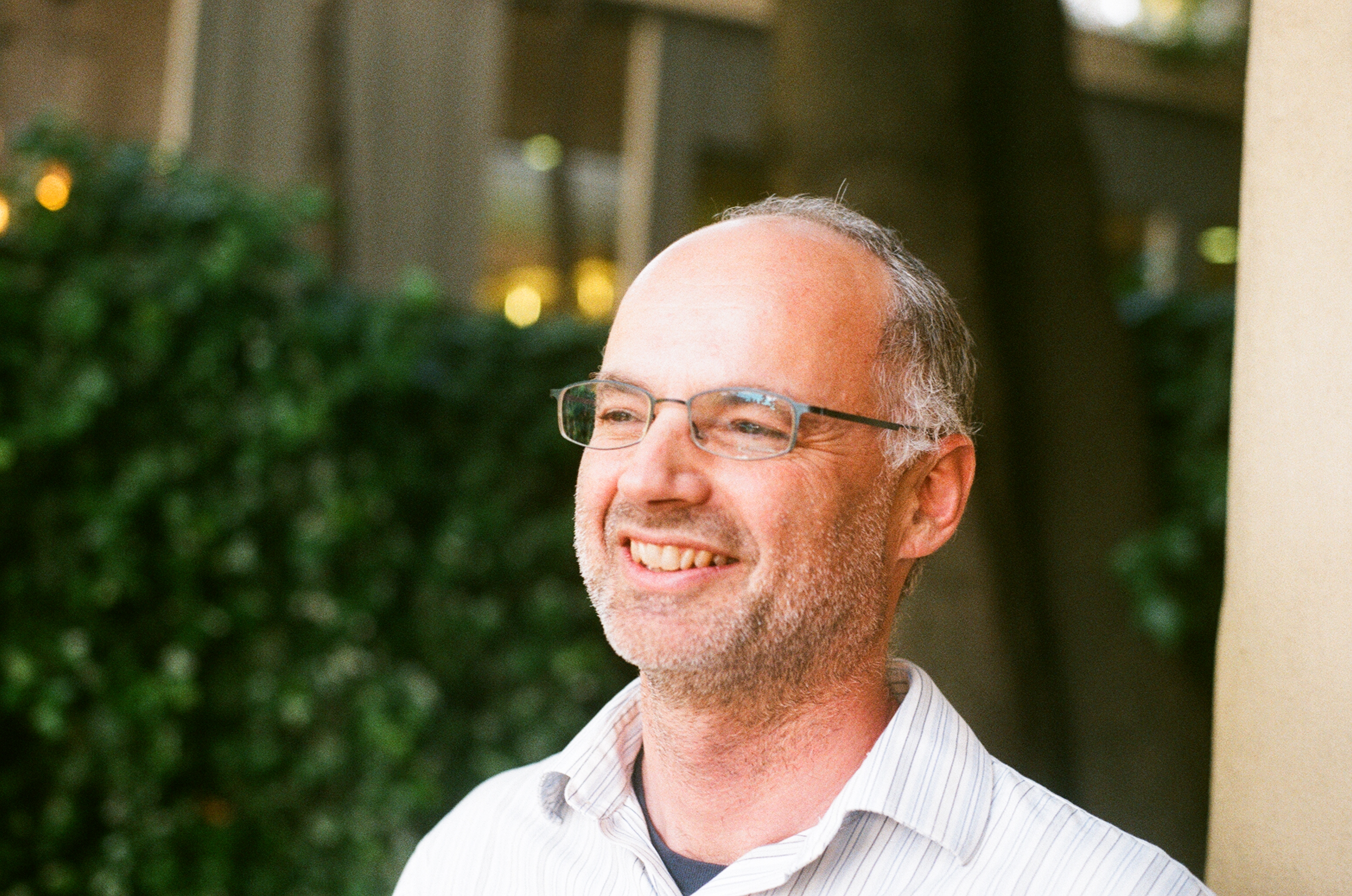 Foto di Peter Teichner